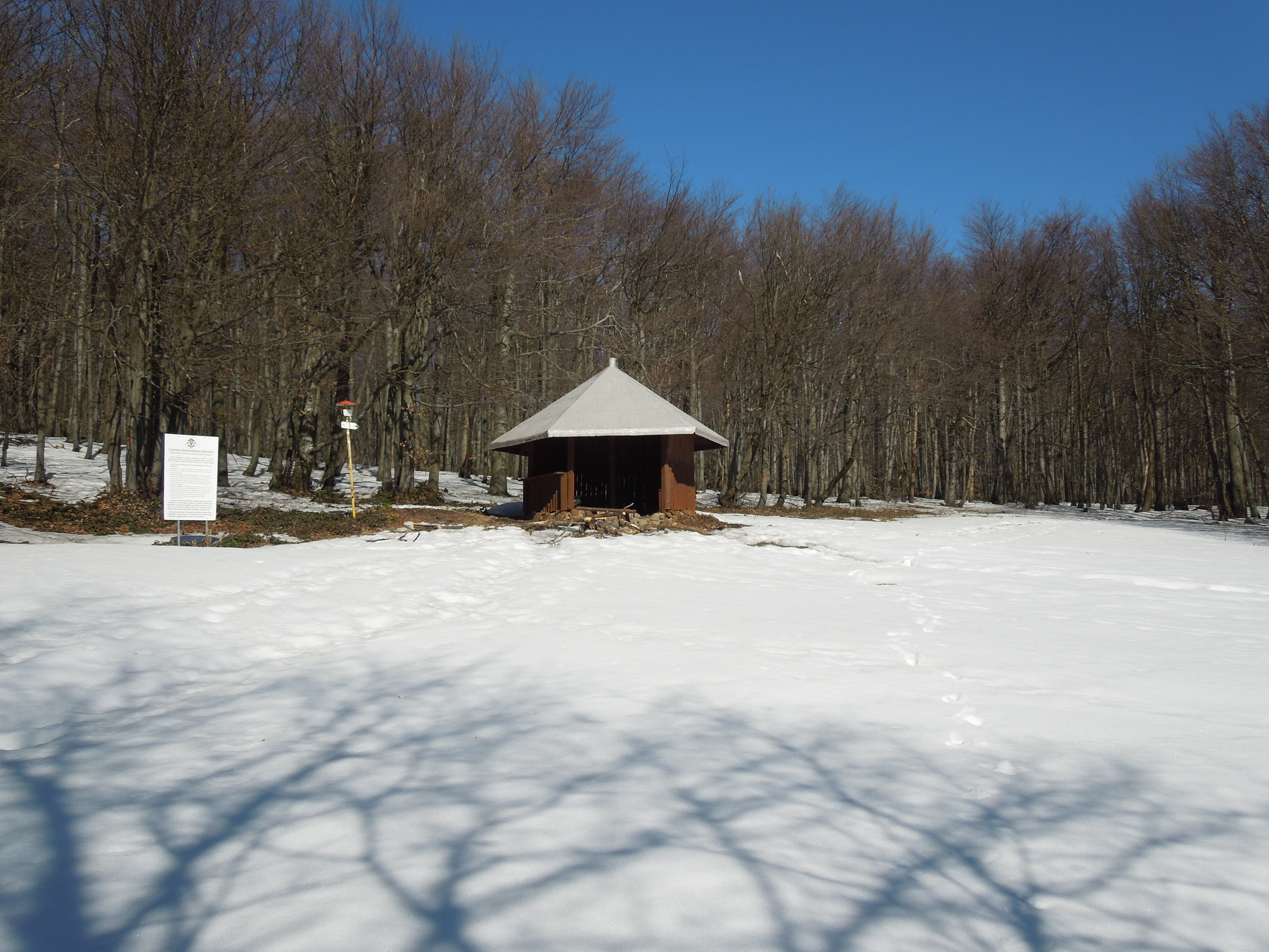 Poľana pod Vihorlatom, odtiaľ vedie lesom chodník na vrchol Vihorlatu This is a photography of Natura 2000 protected area with ID SKUEV0025